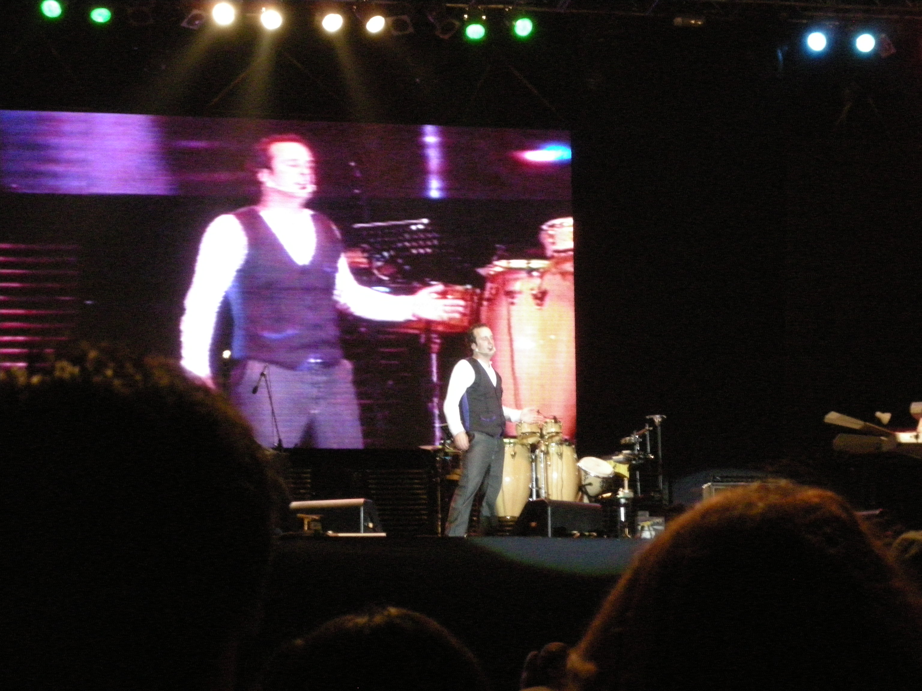 Stefan Kramer, comediante chileno, en 2009.